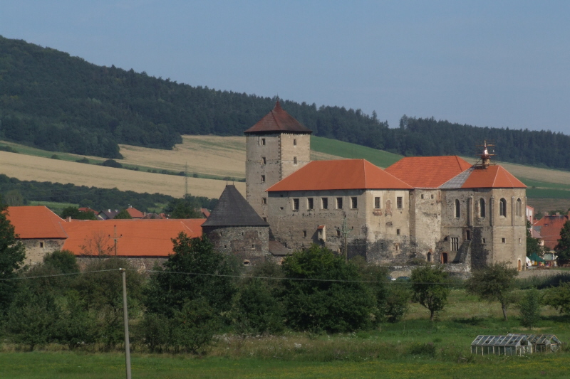 Burg Svihov in Tschechien